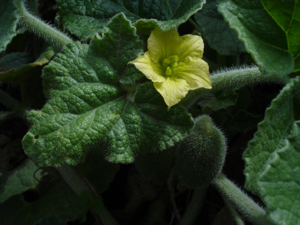 (suppr) (actu) 31 août 2004 à 07:56 . . Bouba (199303 octets) - Ecballium elaterium, Jardin des Plantes de Paris